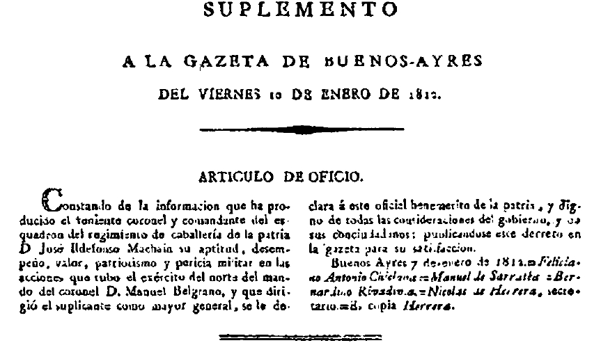 Suplemento a la Gazeta referente a José Ildefonso de Machain